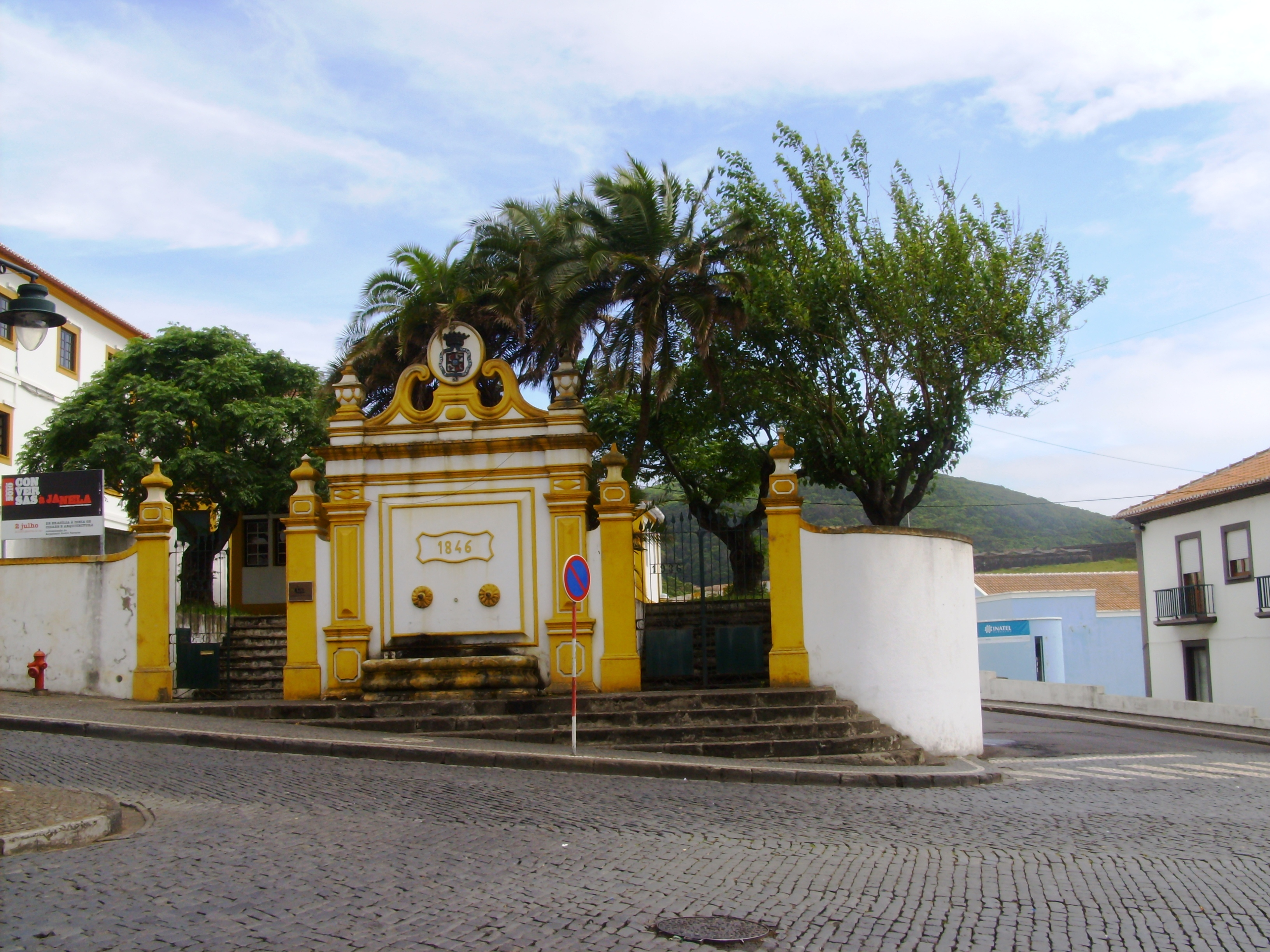 Instituto Açoriano de Cultura, Alto das Covas, Angra do Heroísmo, ilha Terceira, Açores.